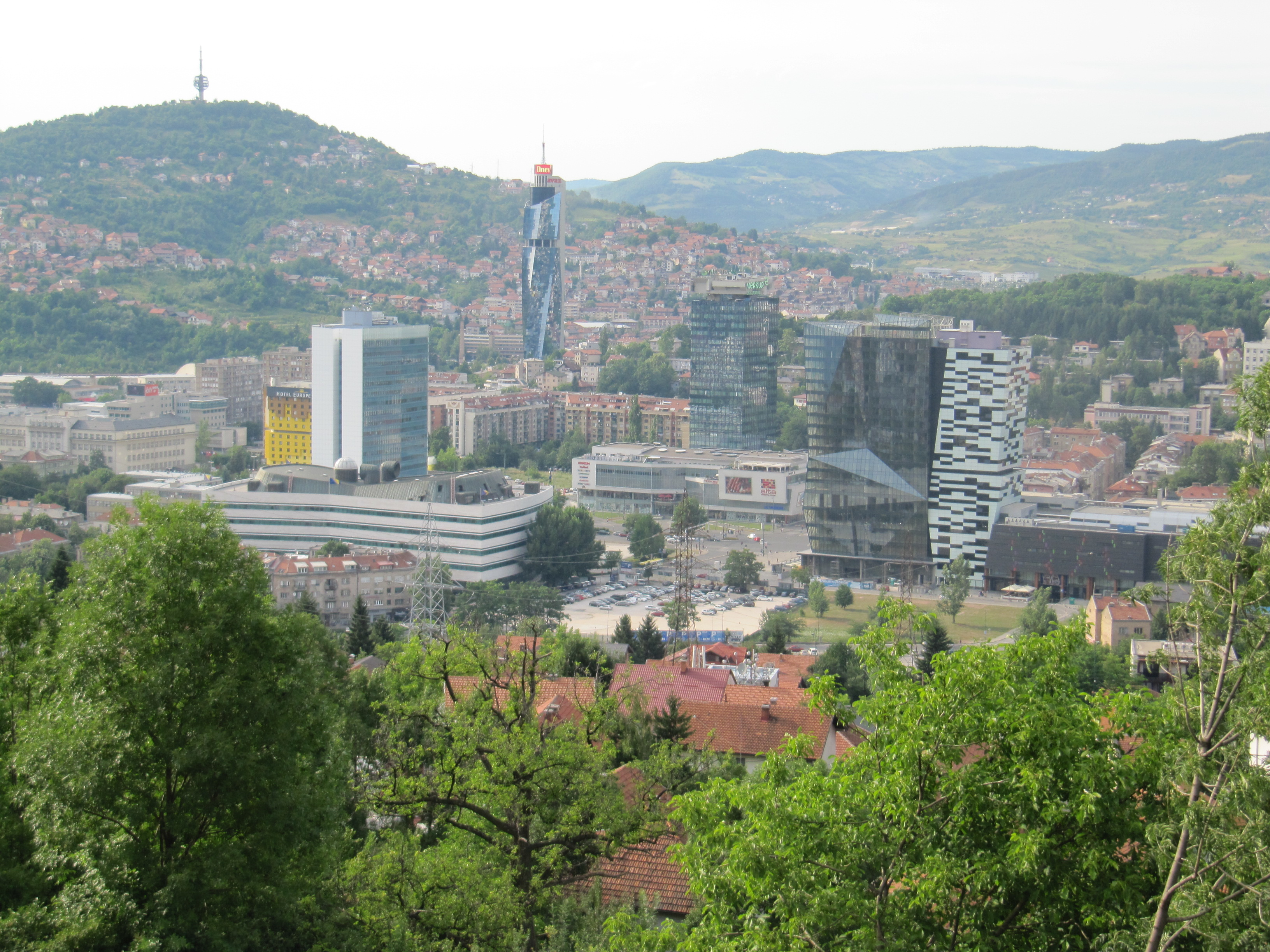 Sarajeva nga lart